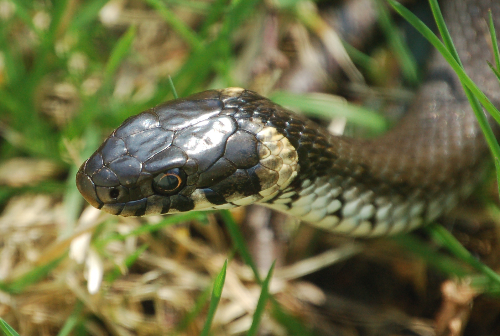 Ringelnatter im Wildpark Eekholt